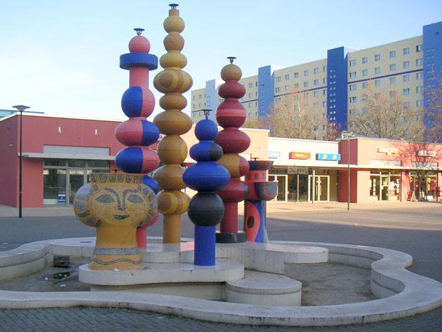 MÃ¤rchenbrunnen auf dem NeustÃ¤dter Platz in Magdeburg